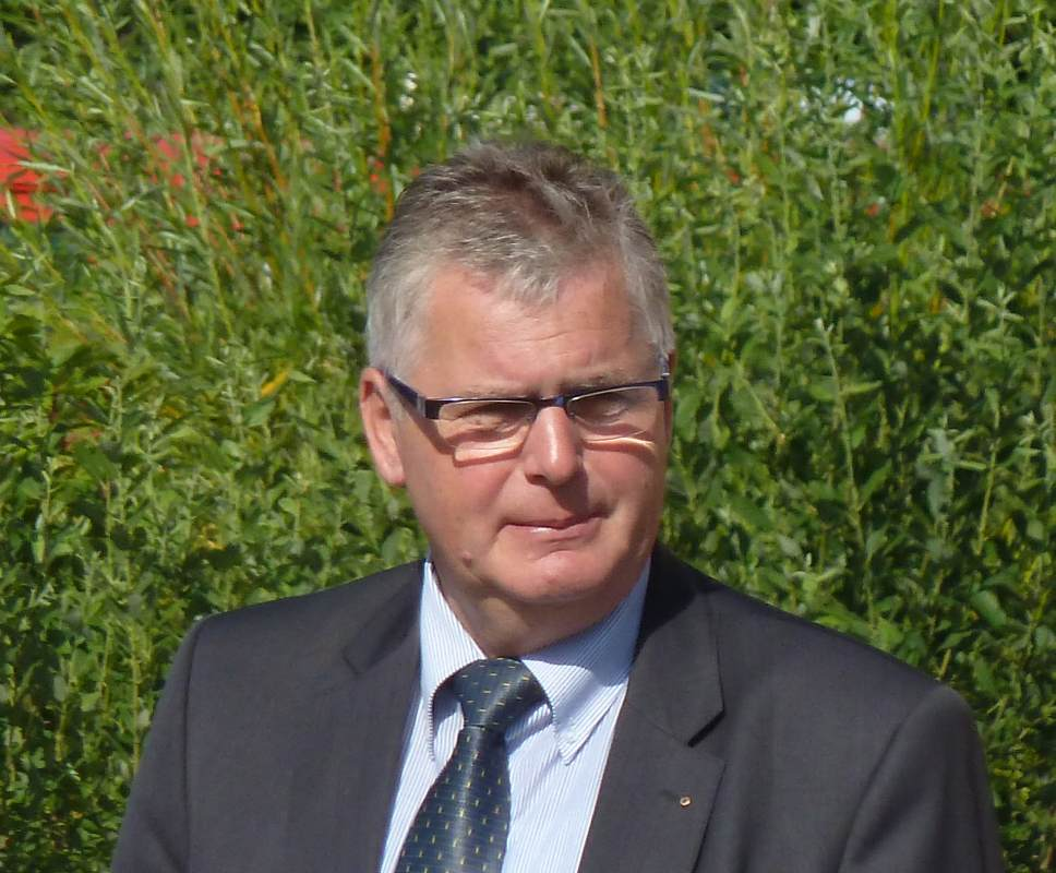 Bernd Lange, Landrat des Landkreises Görlitz, vor seiner Eröffnungsrede des Kreisjugendfeuerwehrtages 2012 in Mulkwitz.